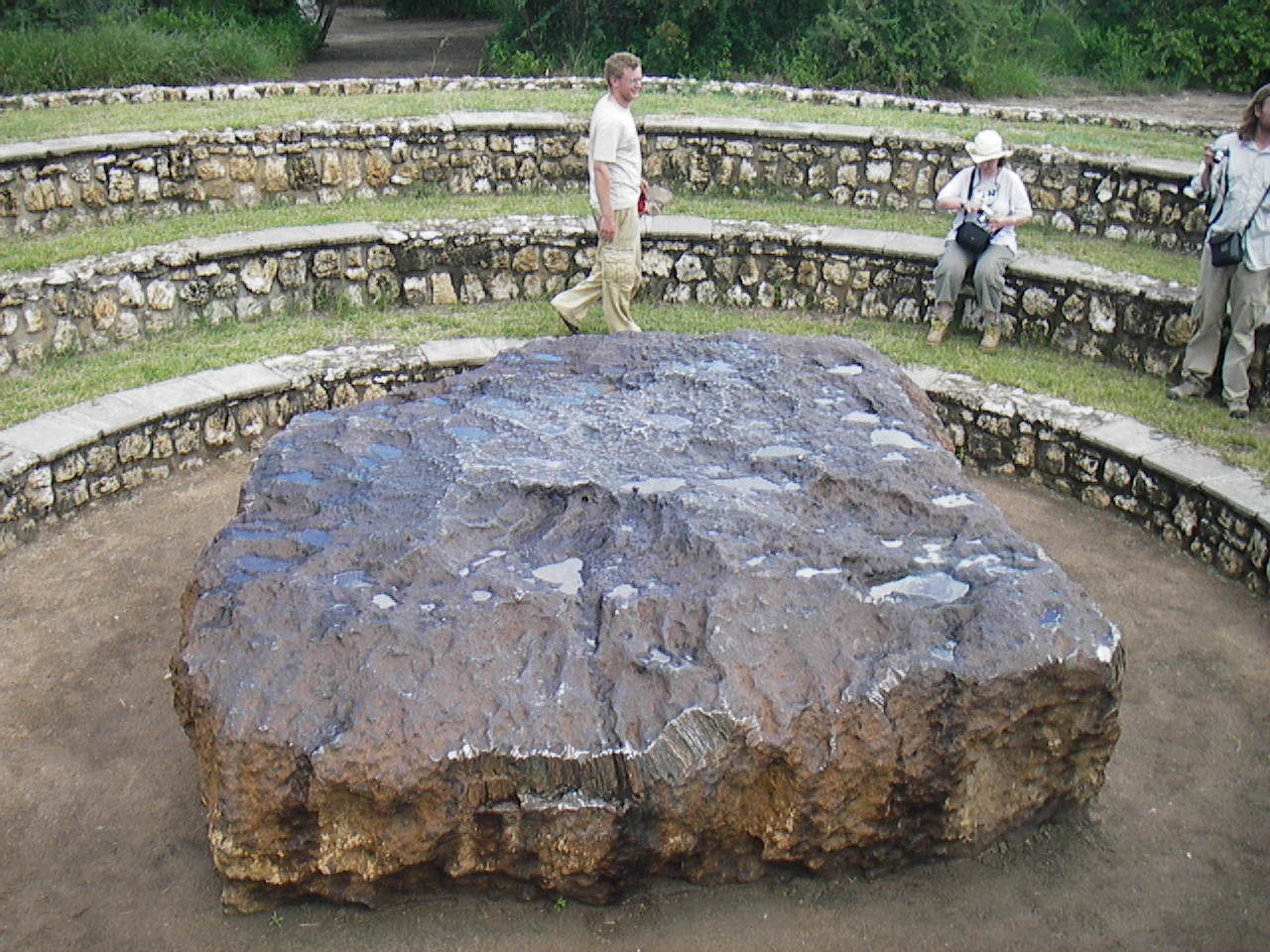 Hoba meteorite near Grootfontein